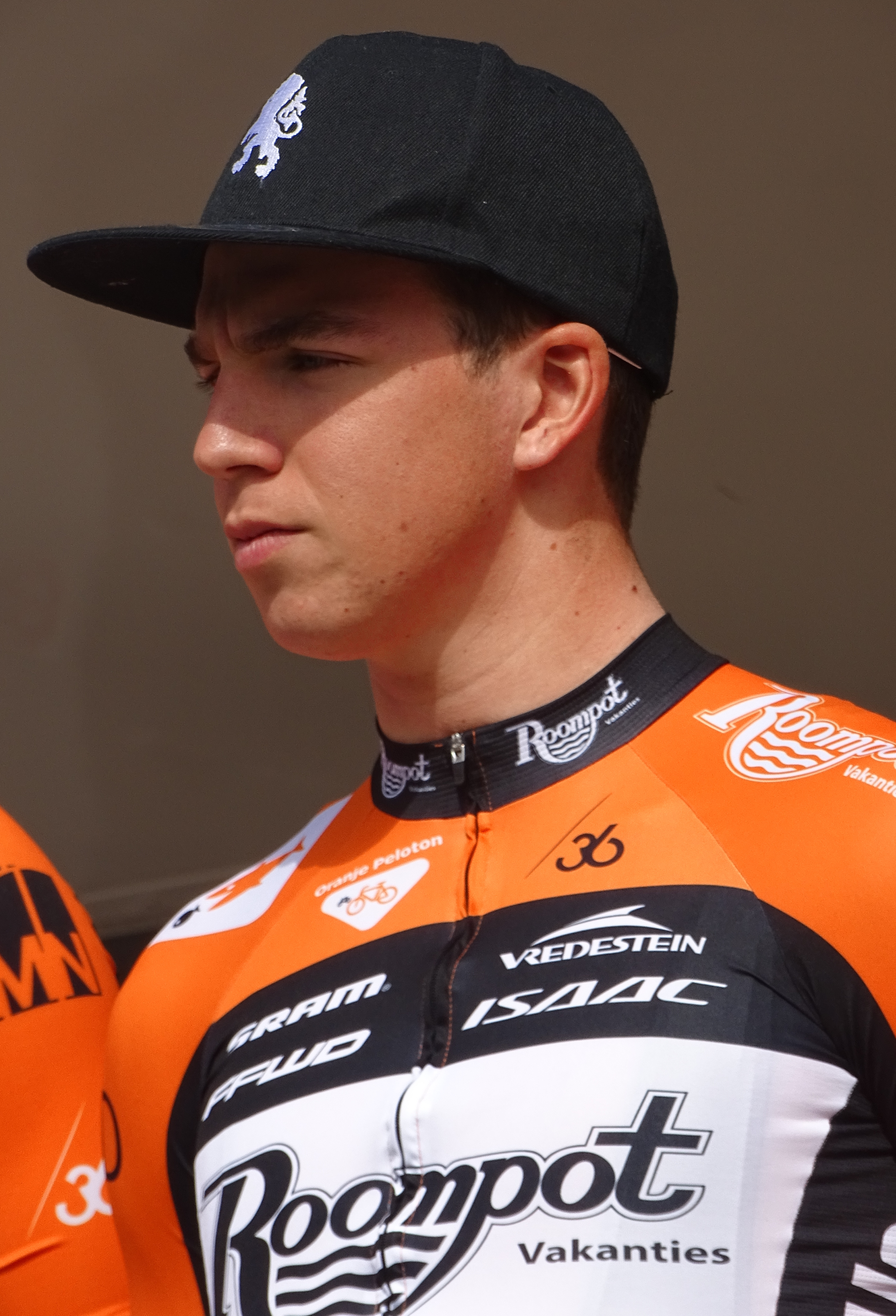 Reportage réalisé le jeudi 16 avril à l'occasion du départ et de l'arrivée du Grand Prix de Denain 2015 à Denain, Nord, Nord-Pas-de-Calais, France.